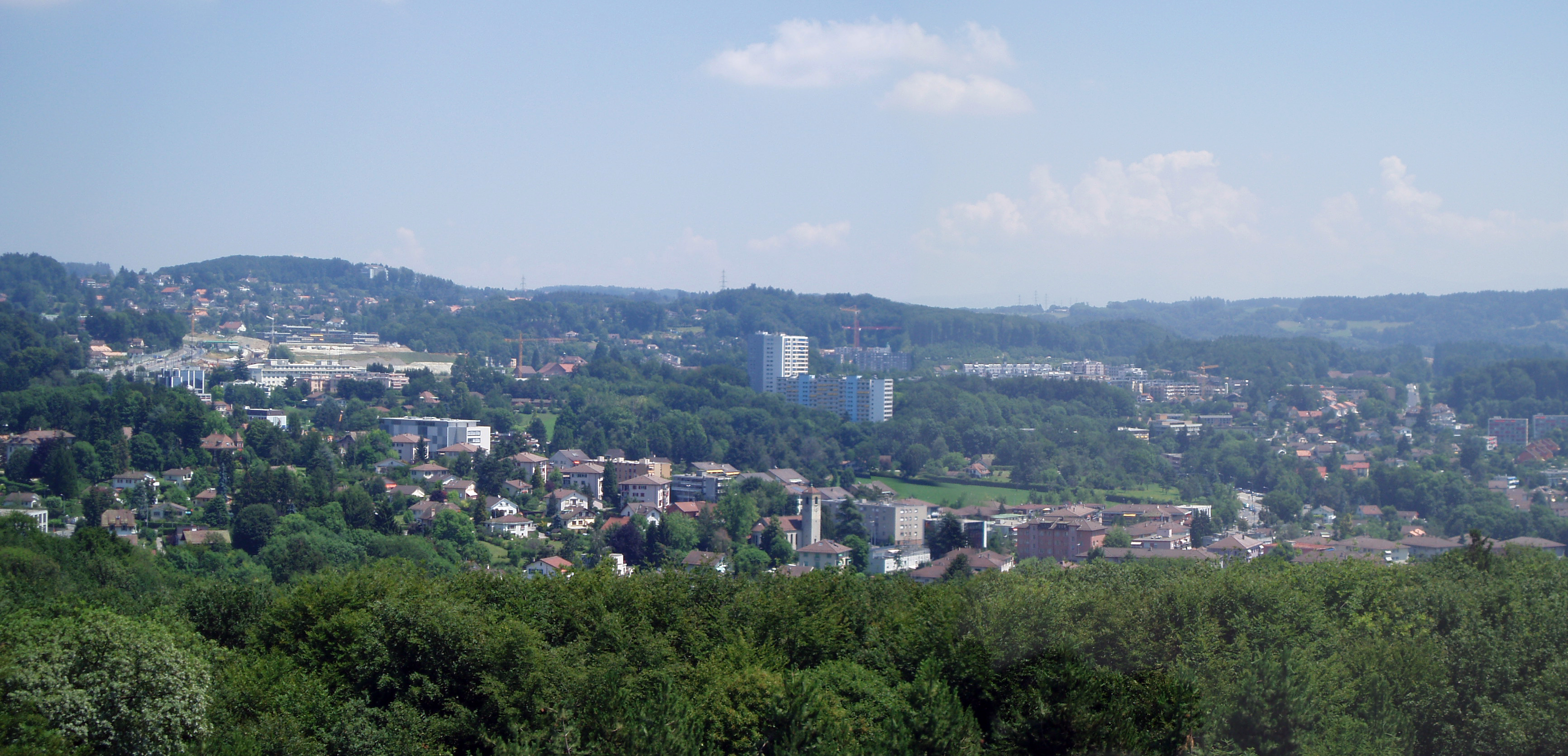 Ocmey, personal photo, Summer 2005, Vue de Lausanne depuis la Tour de Sauvabelin